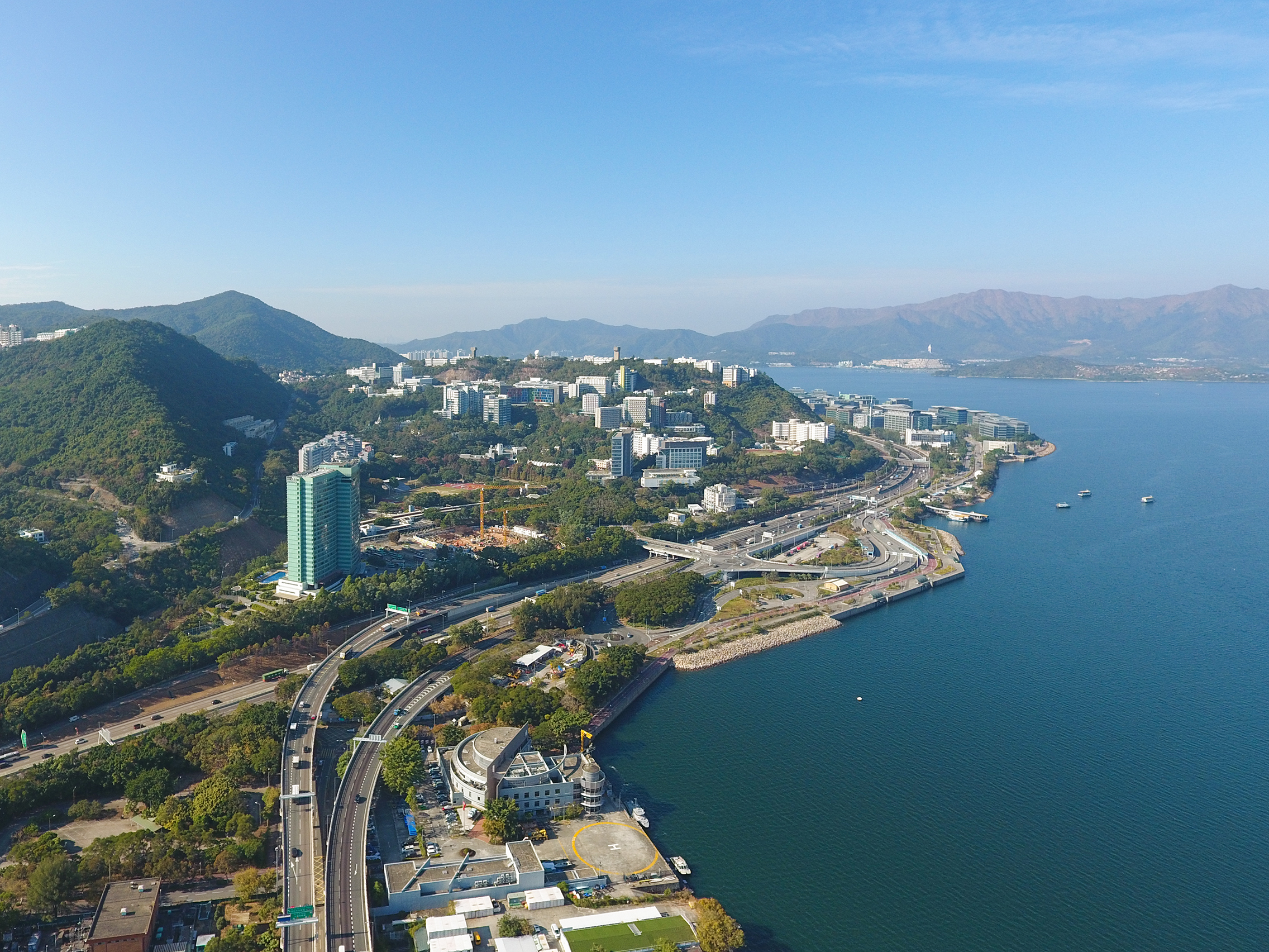 Ma Liu Shui Aerial View